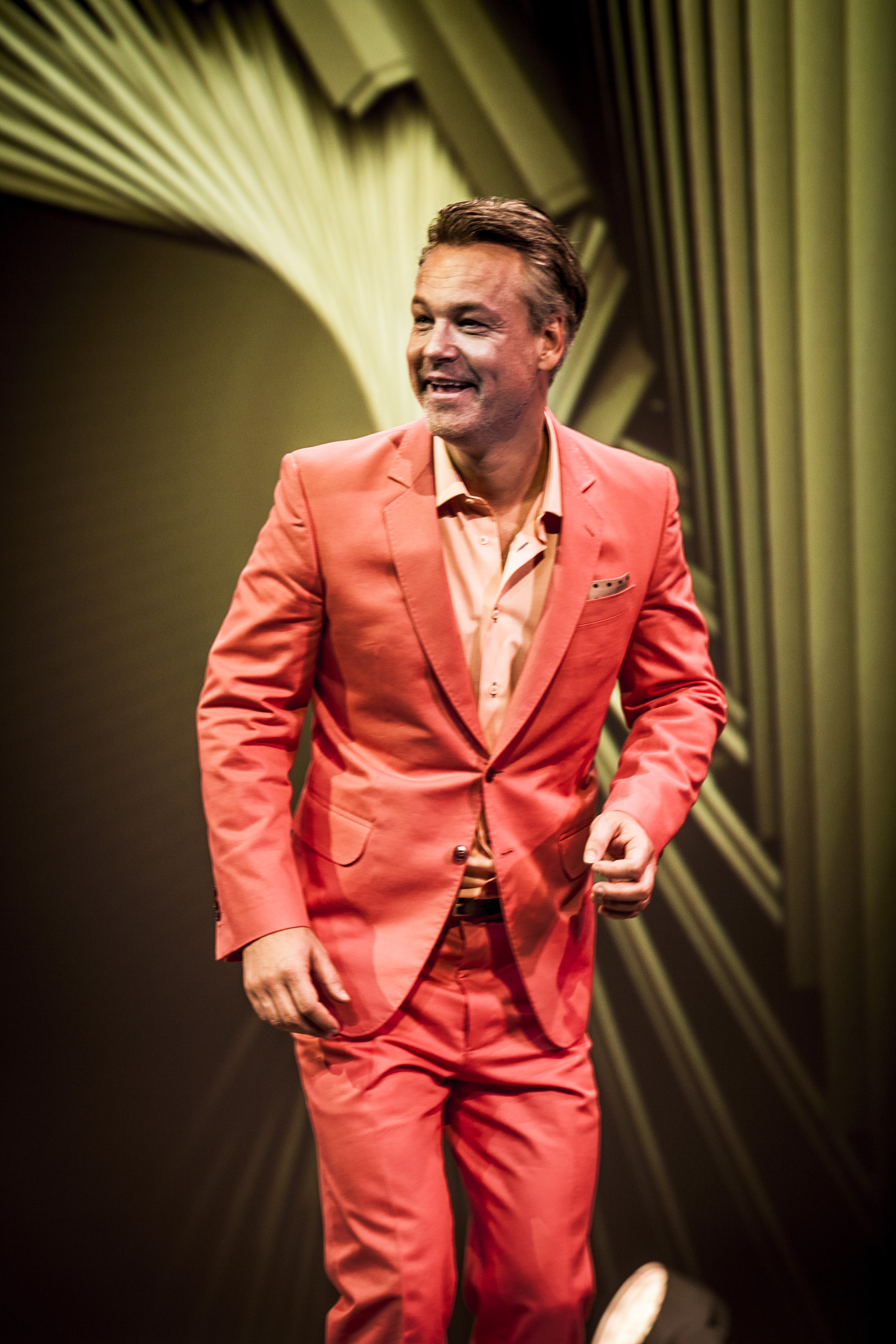 Henrik Schyffert från förställningen ÄGD - Vad kostar ett rikare liv?.